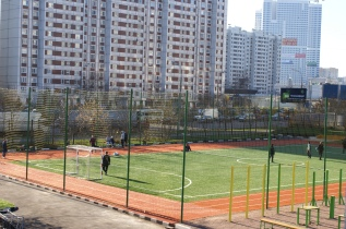 Футбольное поле лицея №1580